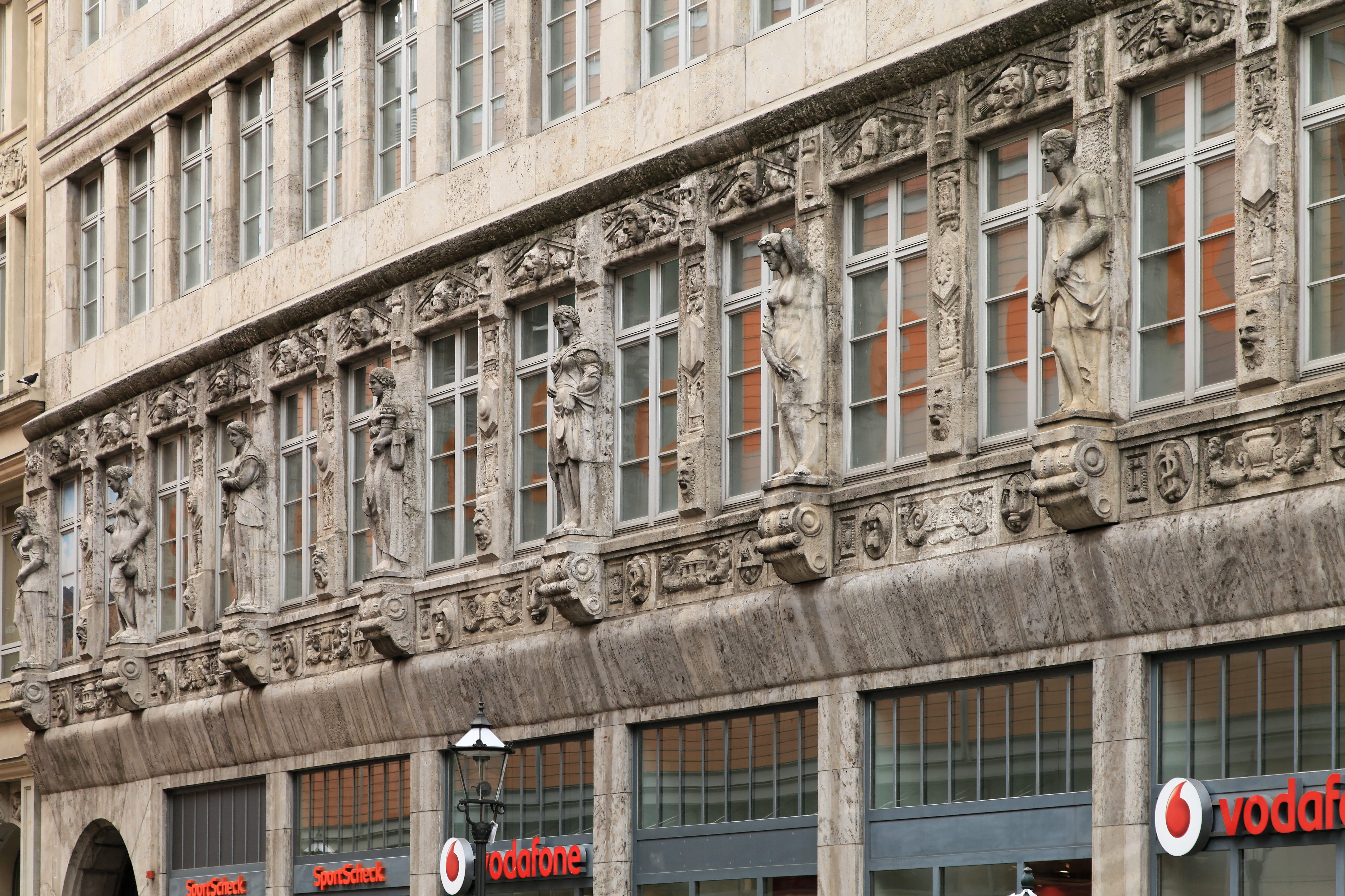 Zentral-Messepalast, hier Neumarkt in Leipzig